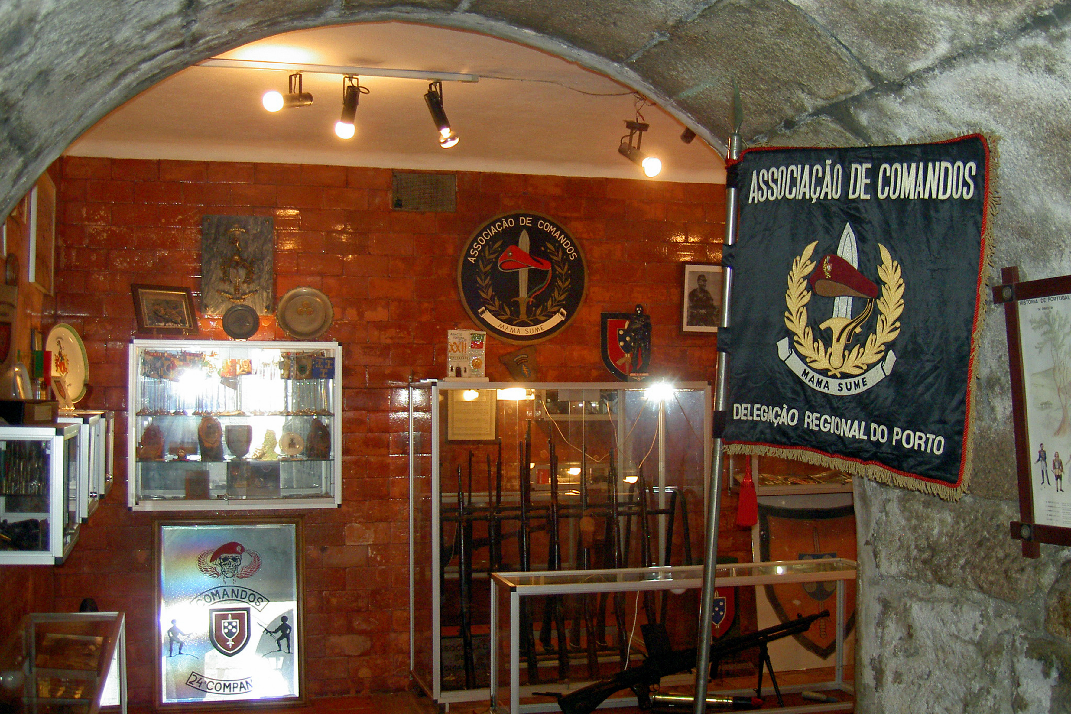 Castelo do Queijo ou Fortaleza do Queijo This file was uploaded for Wiki Loves Monuments in Portugal with the unique identifier 74496.